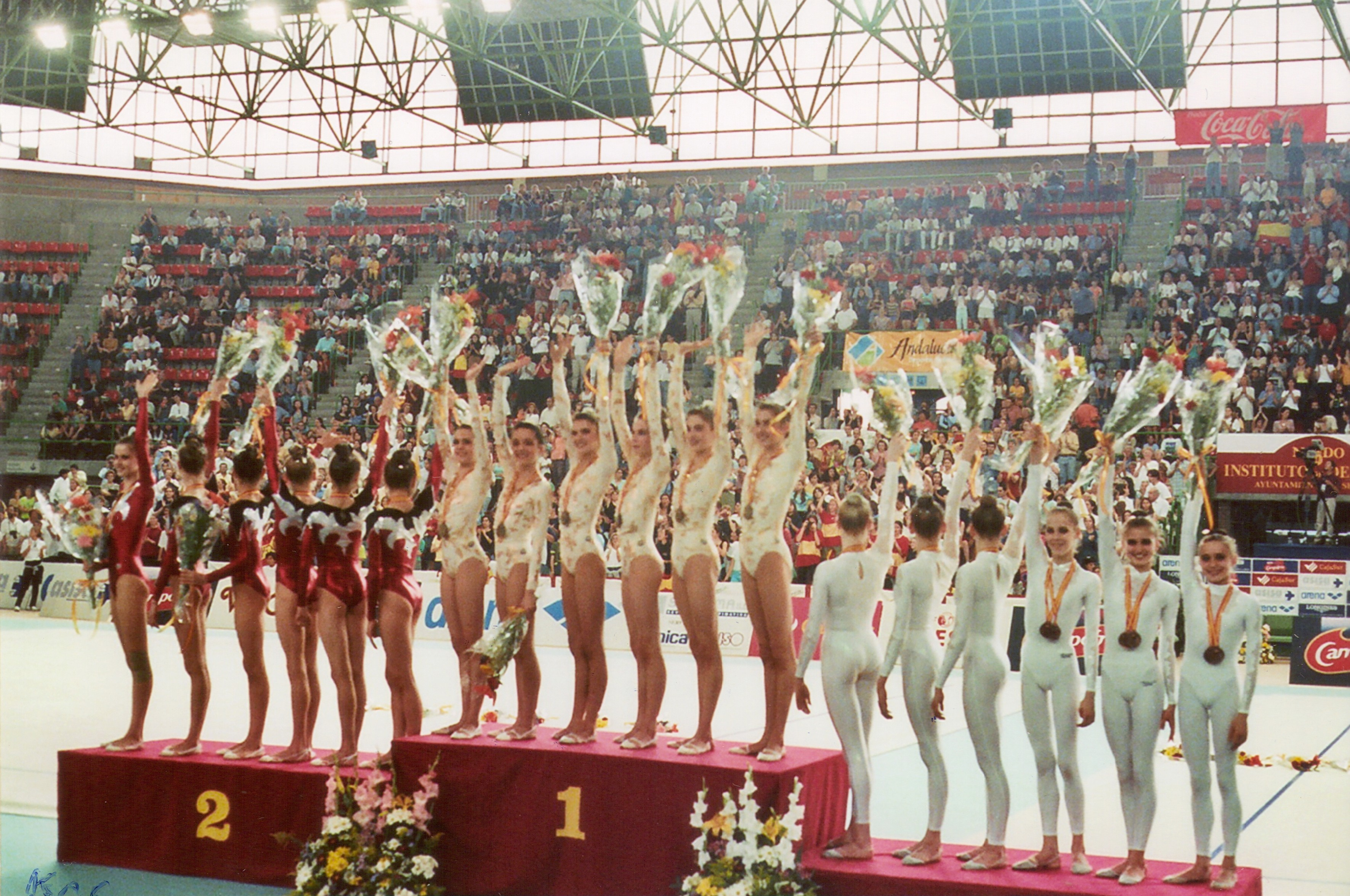 Podio de la final 3 cintas y 2 aros en conjuntos en el Campeonato Mundial de Gimnasia Rítmica de 1998 en Sevilla. De izquierda a derecha: Bielorrusia, España y Ucrania.